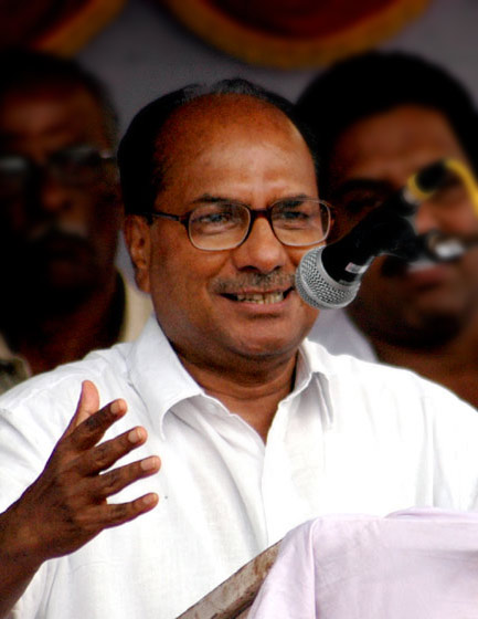 എ.കെ. ആന്റണി. കേന്ദ്ര പ്രതിരോധ മന്ത്രി